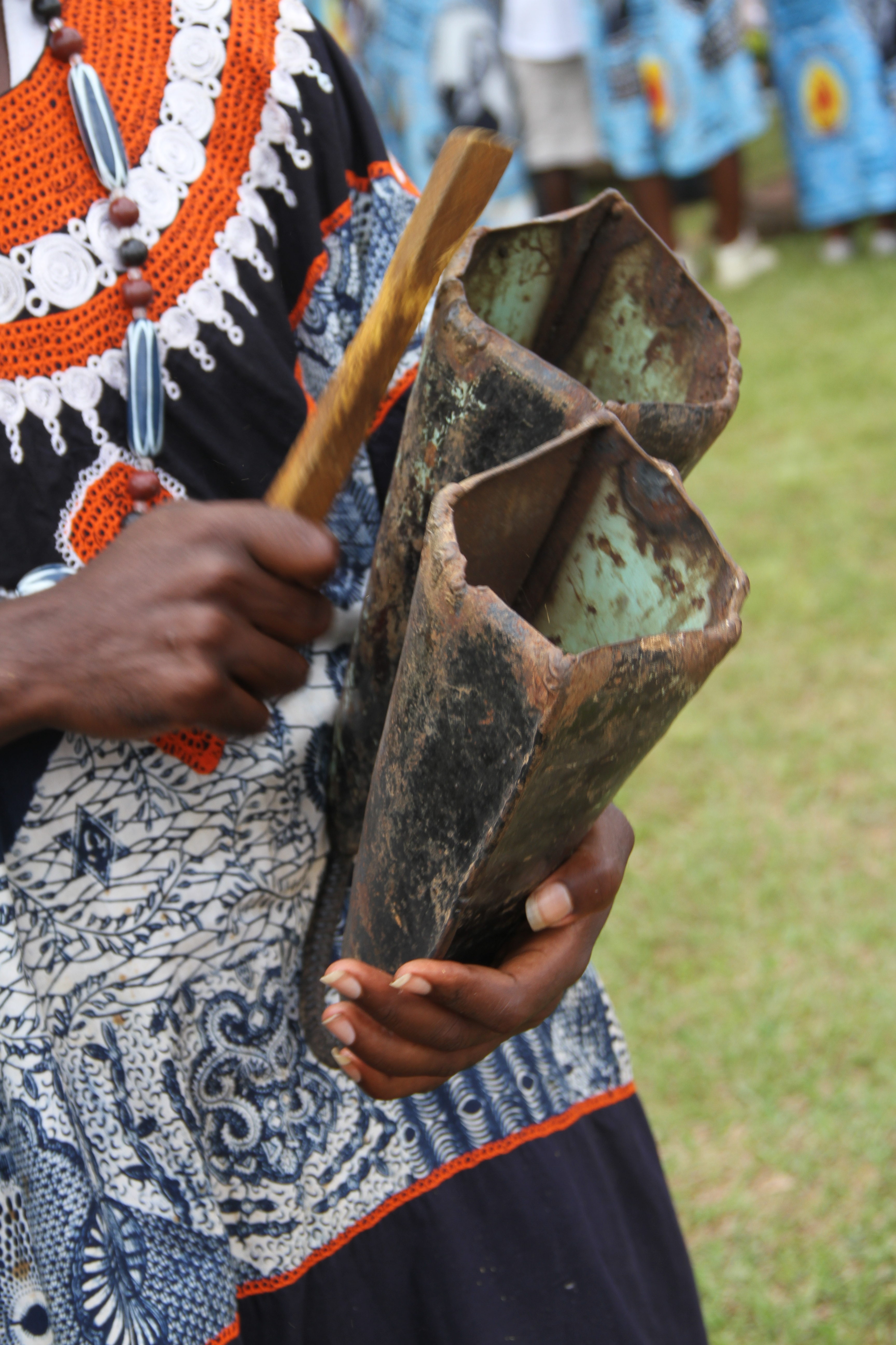 Instrumentiste de la région du nord-ouest du Cameroun présenté lors du Fenac (Festival National des Arts et de la Culture) à Yaoundé au Cameroun This is an image from Cameroon